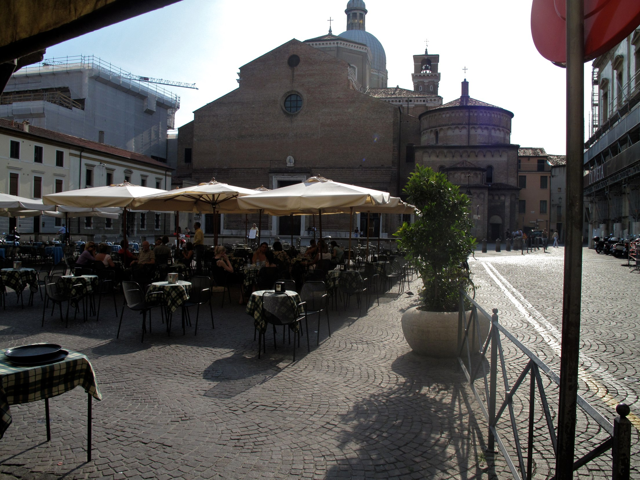 Piazza Duomo, Padova, Italia